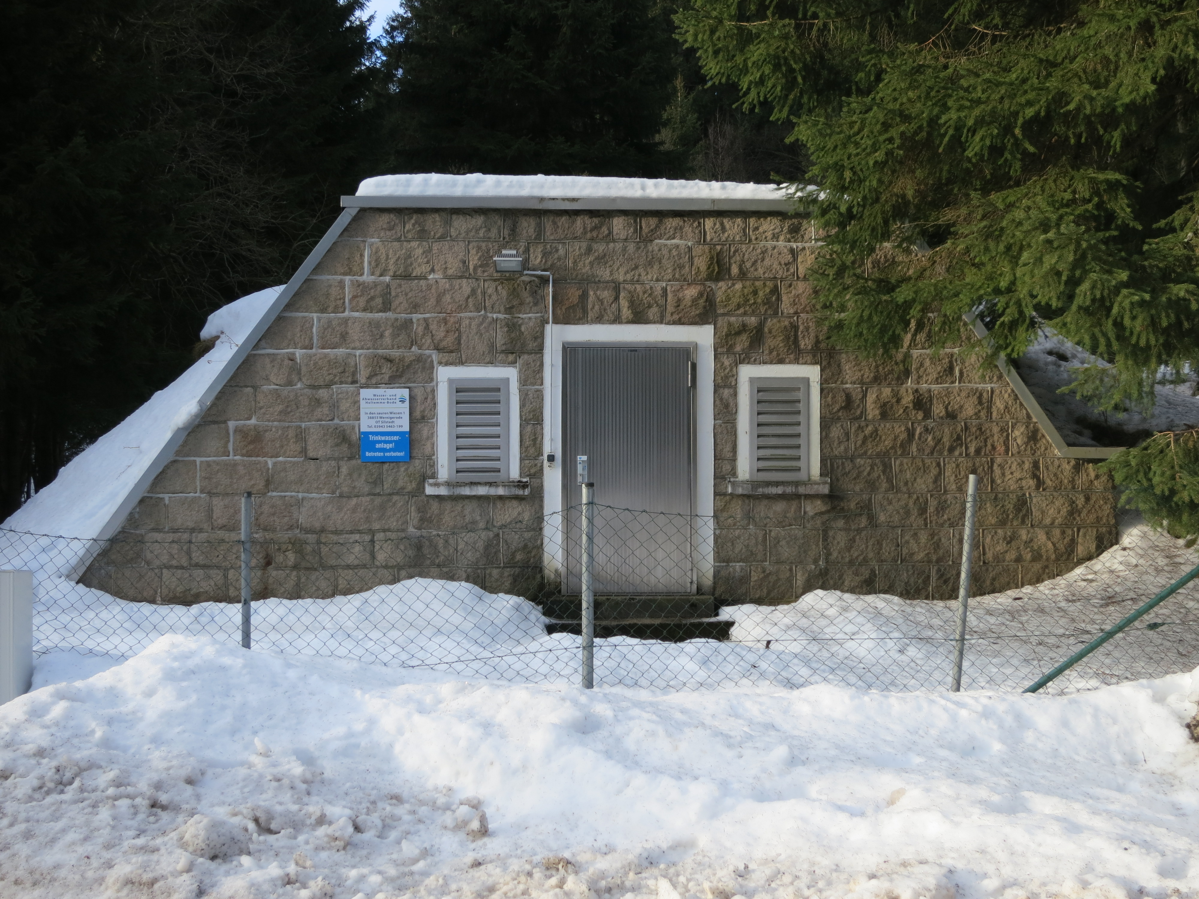 Das Schierker Wasserwerk an der Brockenstraße oberhalb der Schluftwiesen